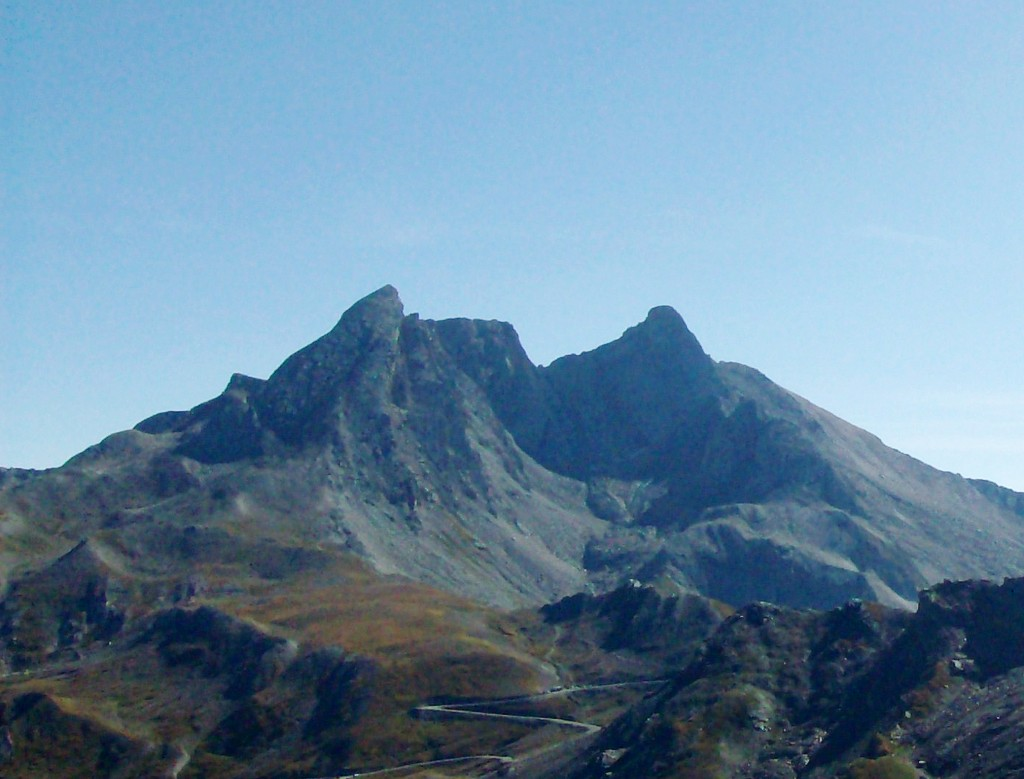 Il Pan di Zucchero (a sinistra) ed il Pic d'Asti (a destra) visti da ovest. Nel mezzo la Rocca Rossa